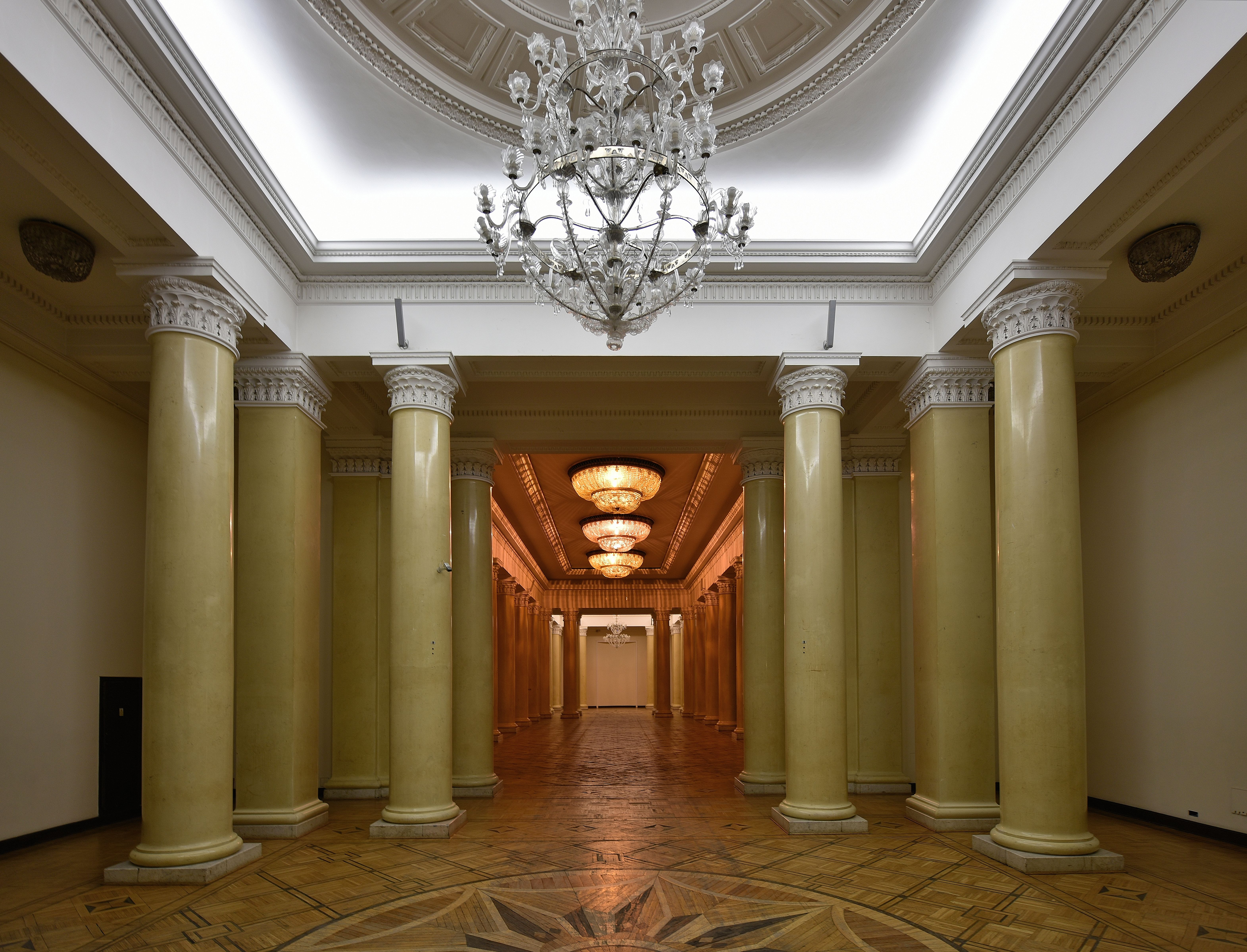 Sala im. Stefana Starzyńskiego w Pałacu Kultury i Nauki